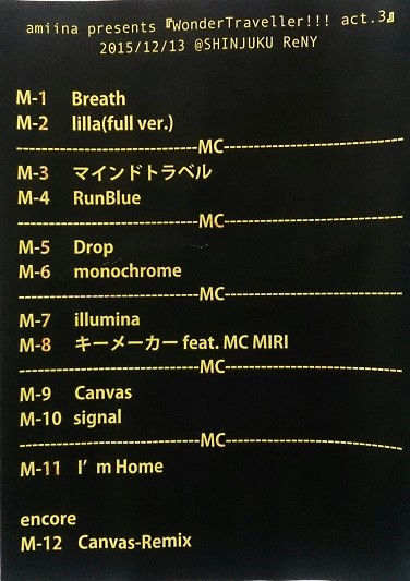 amiinaセトリボード(20151213(1))